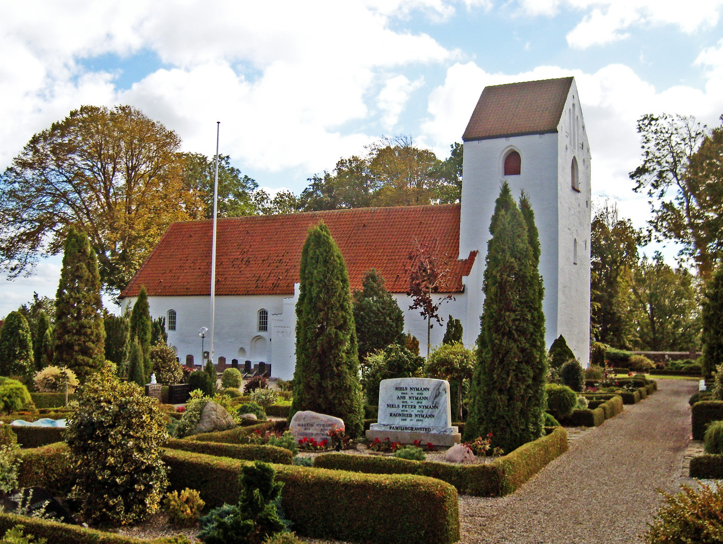 fra nordvest